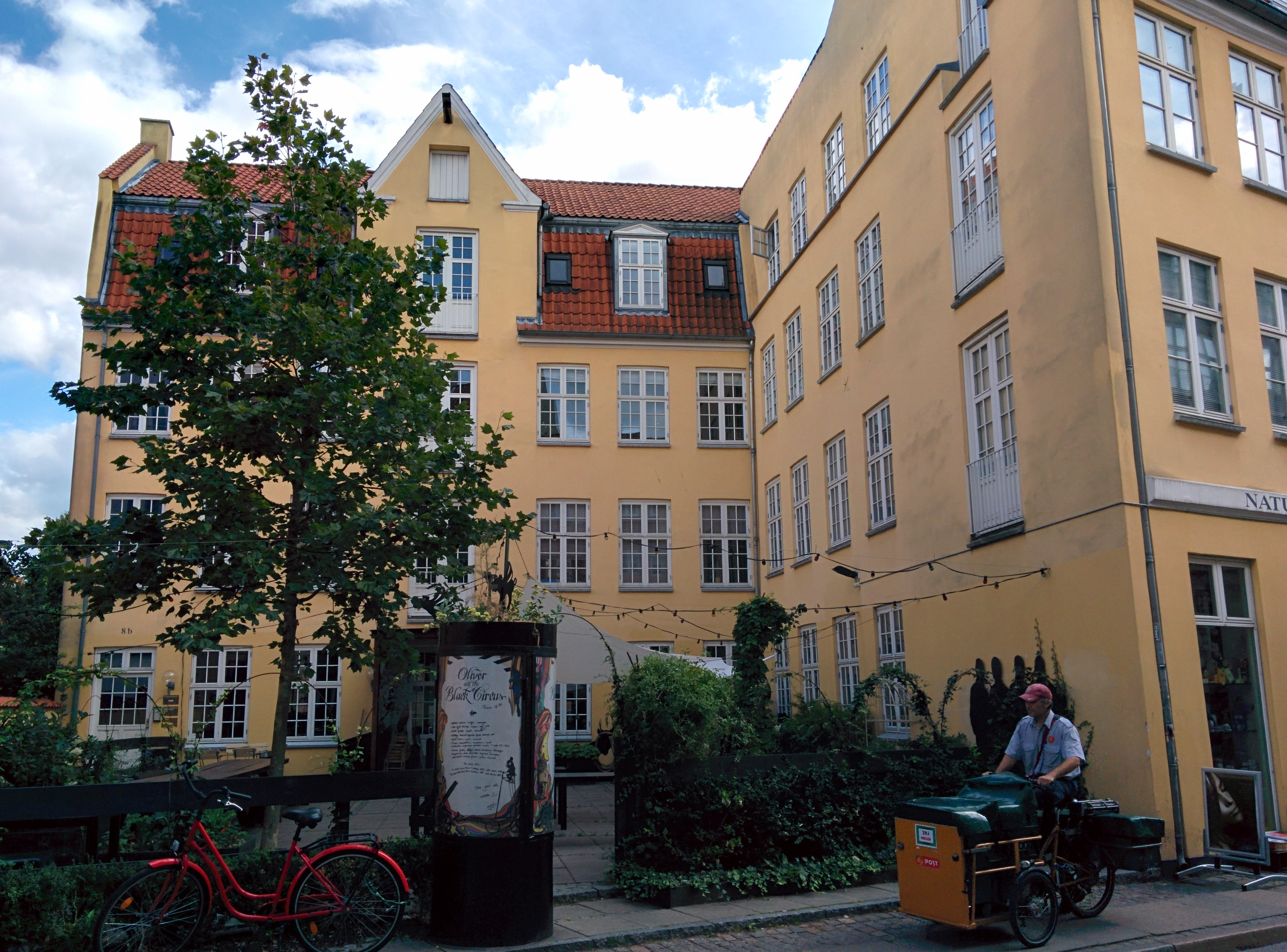 Teglgårdstræde (No. 6) in Copenhagen, Denmark